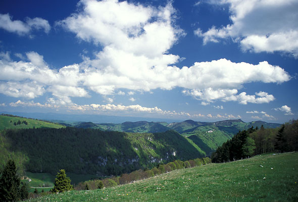 Teil des Faltenjuras im Kanton Solothurn: im Vordergrund das Guldental, rechts der Passwang, im Hintergrund die Höhen des Schwarzwaldes